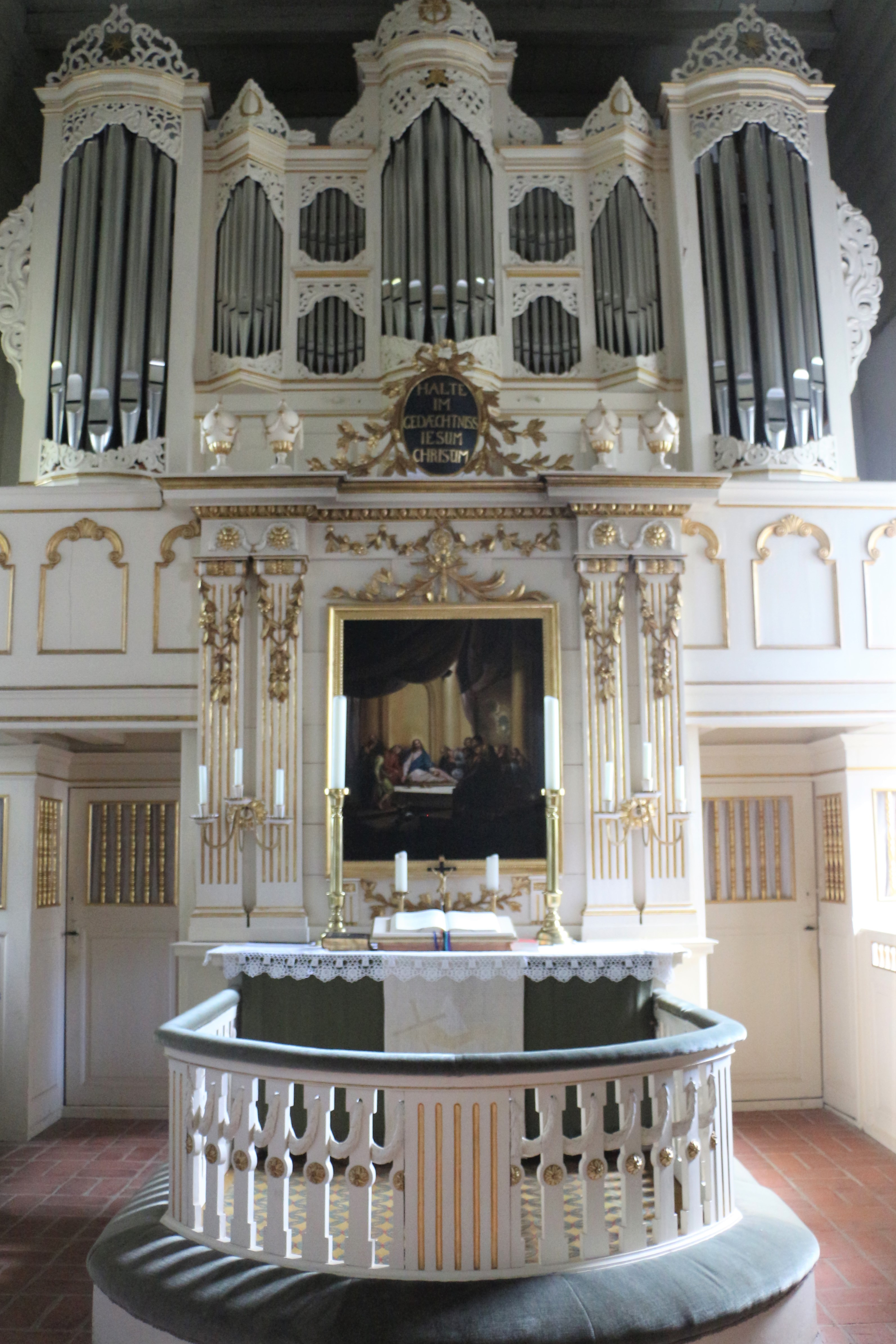 Altar und Orgel der Kirche in Ulsnis. Die Orgel ist ein Werk von Johann Daniel Busch.